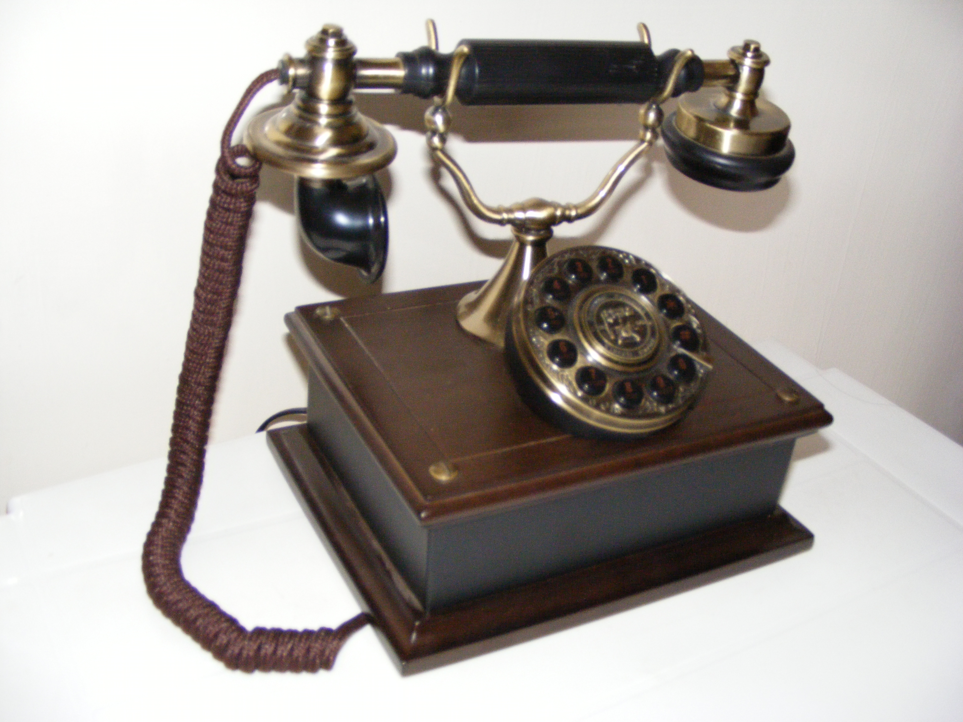 Áltárcsás nosztalgiatelefon (Telefónia múzeum, Budapest)